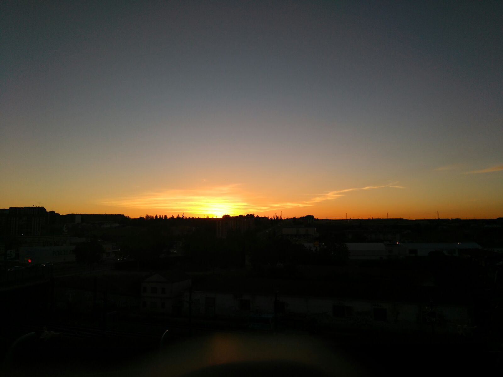 Puesta de sol en Zamora 13 de julio de 2016 Foto Mercedes Sánchez Pascual